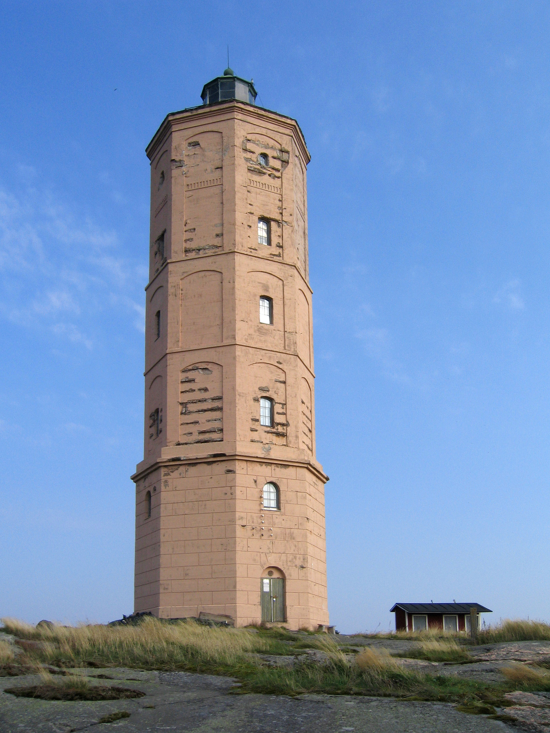 Söderskär lighthouse (not in use any more)